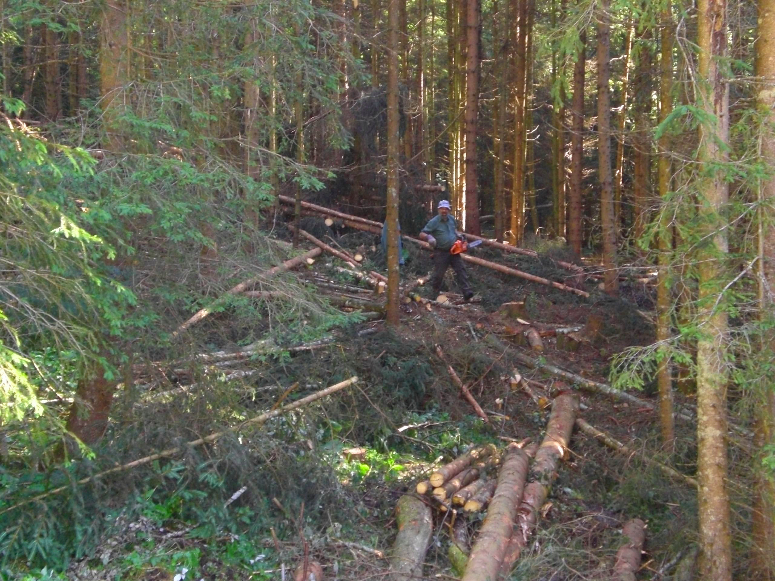 Windwurf 2008